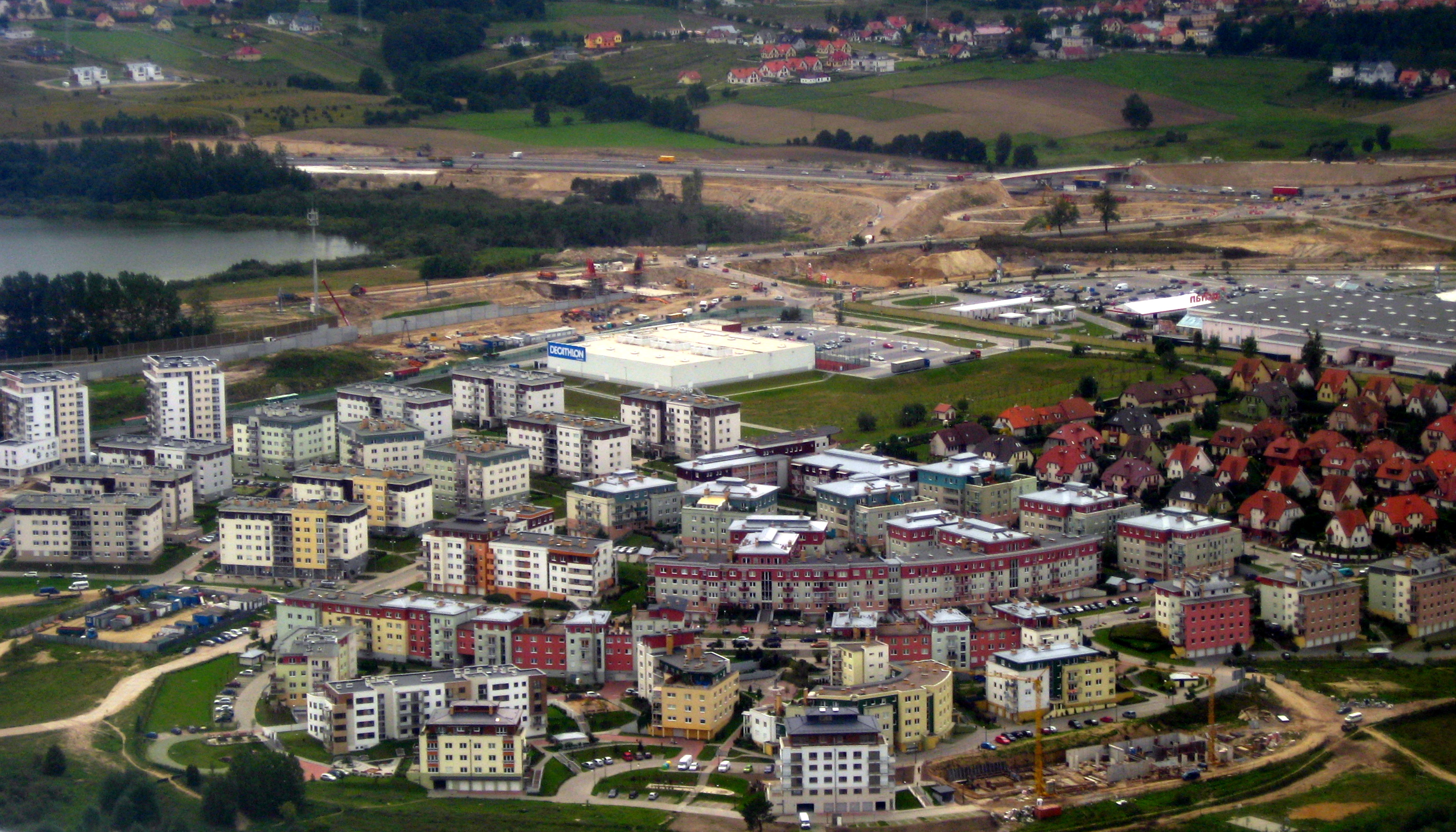 Gdańsk Kiełpinek. Zdjęcie lotnicze. W tle sklep Decathlon.